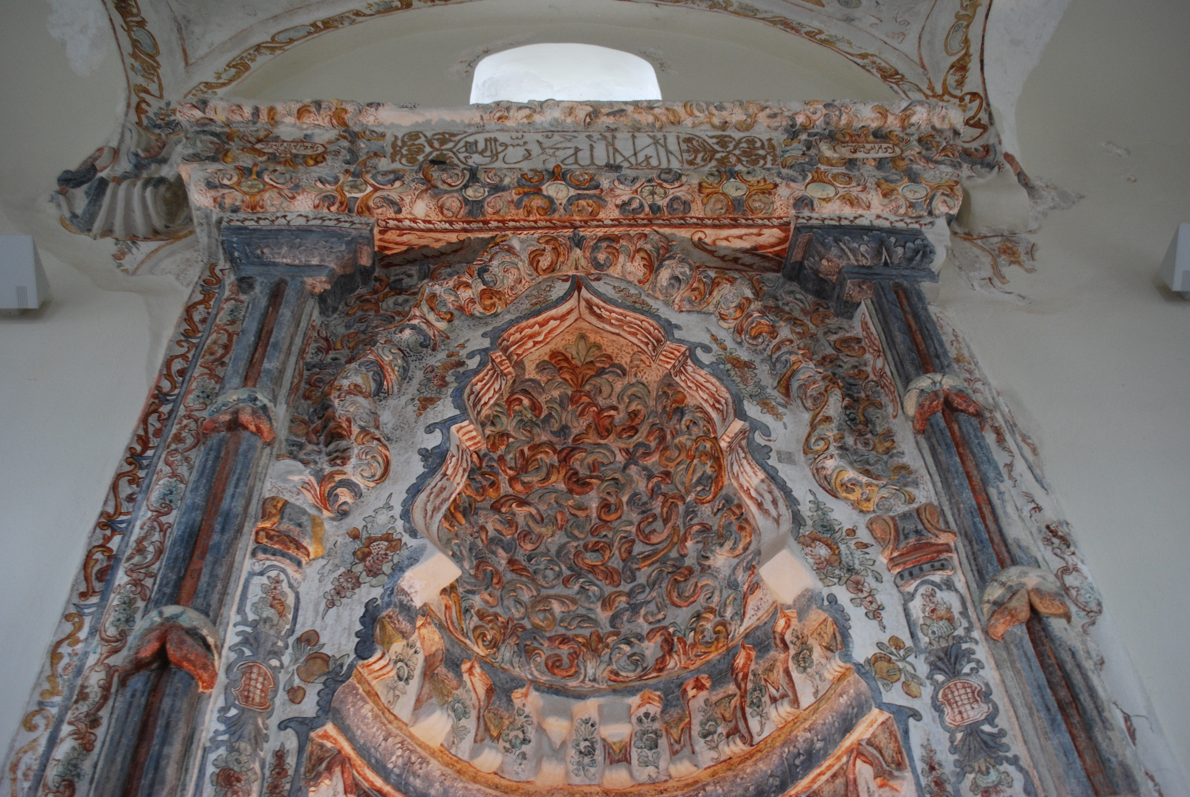 Vue de Ioannina.